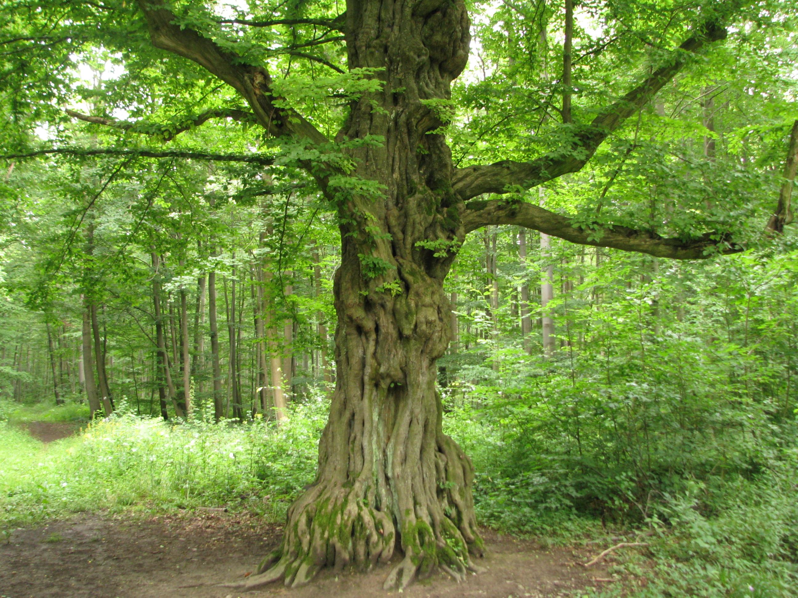 Corpusbuche im Mühlhäuser Stadtwald.